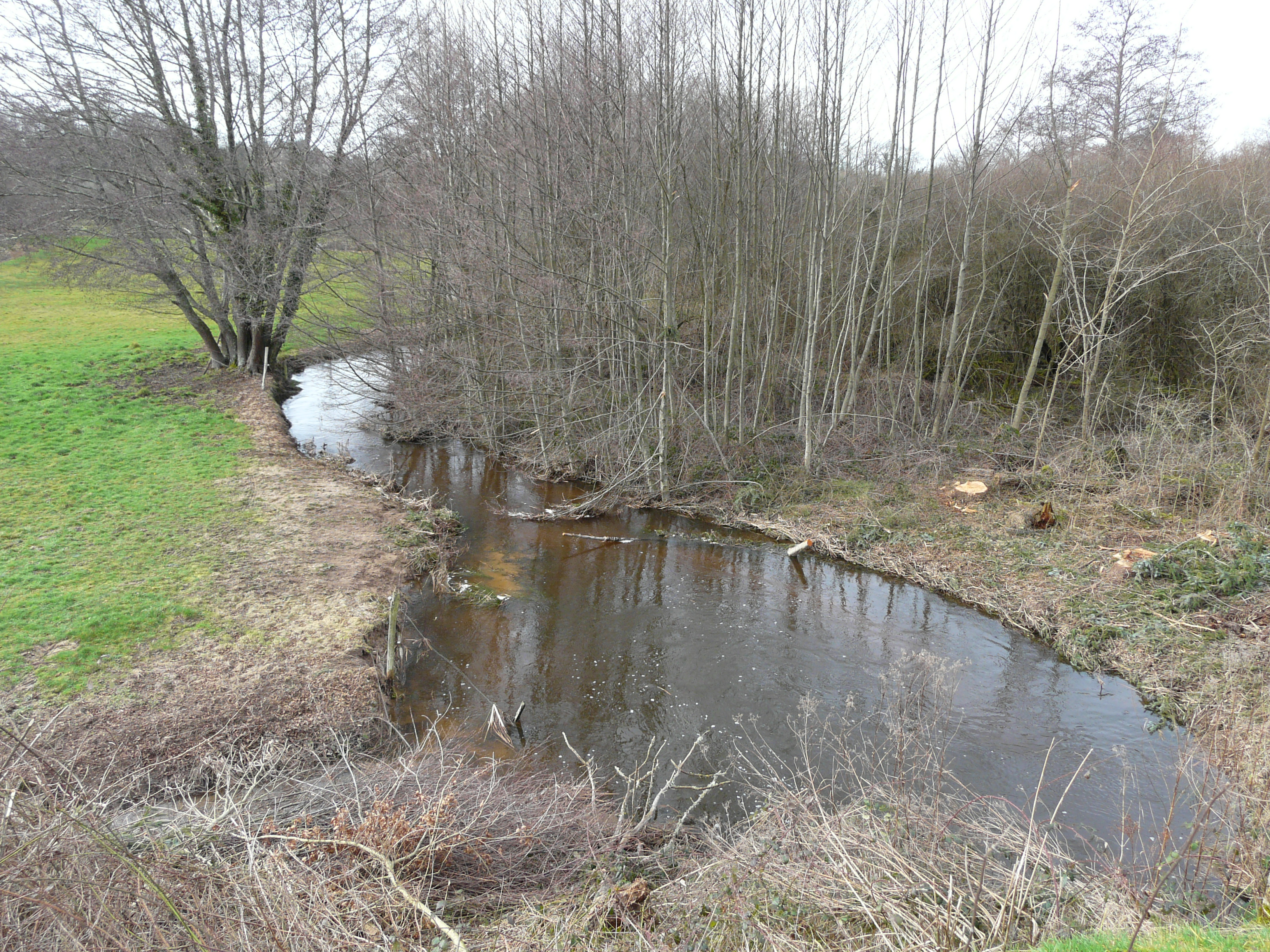 Le Nauzon marque la limite entre Champniers-et-Reilhac, (Dordogne, région Aquitaine) à gauche, et Saint-Mathieu (Haute-Vienne, région Limousin). Vue prise vers l'aval au pont de la route départementale 675.